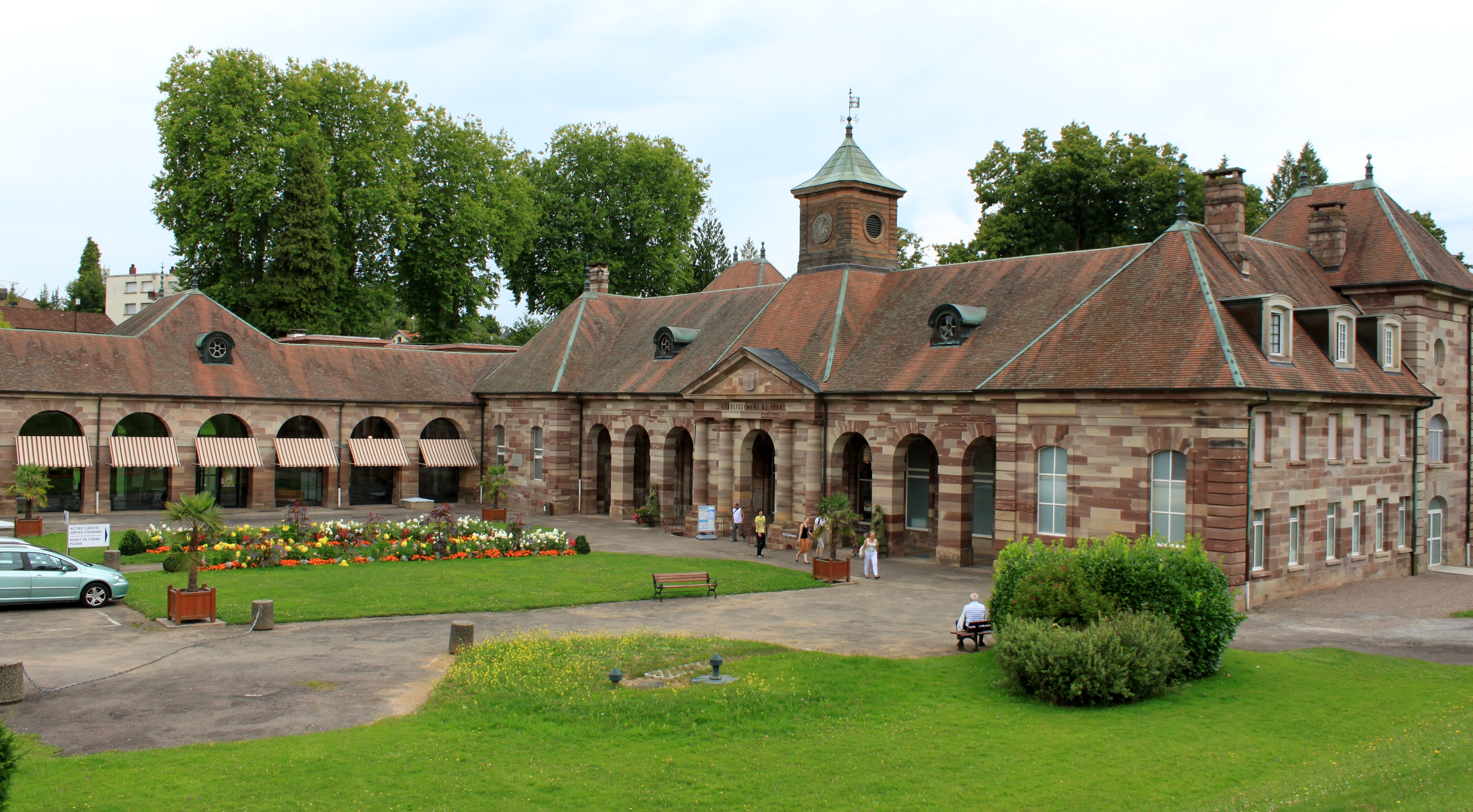 Luxeuil-les-Bains, France